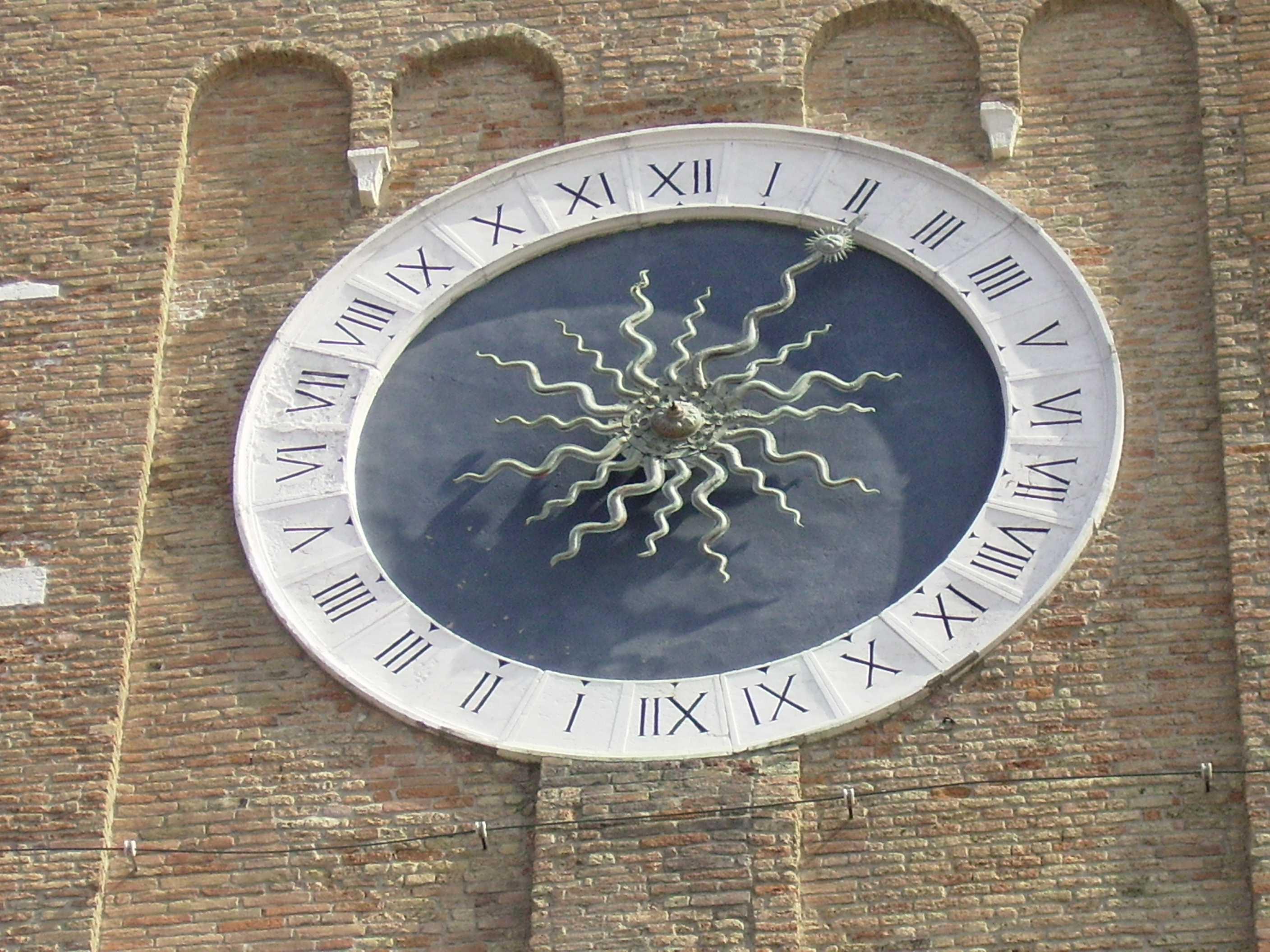 AV, OROLOGIO DELLA TORRE DI S.ANDREA (CHIOGGIA)